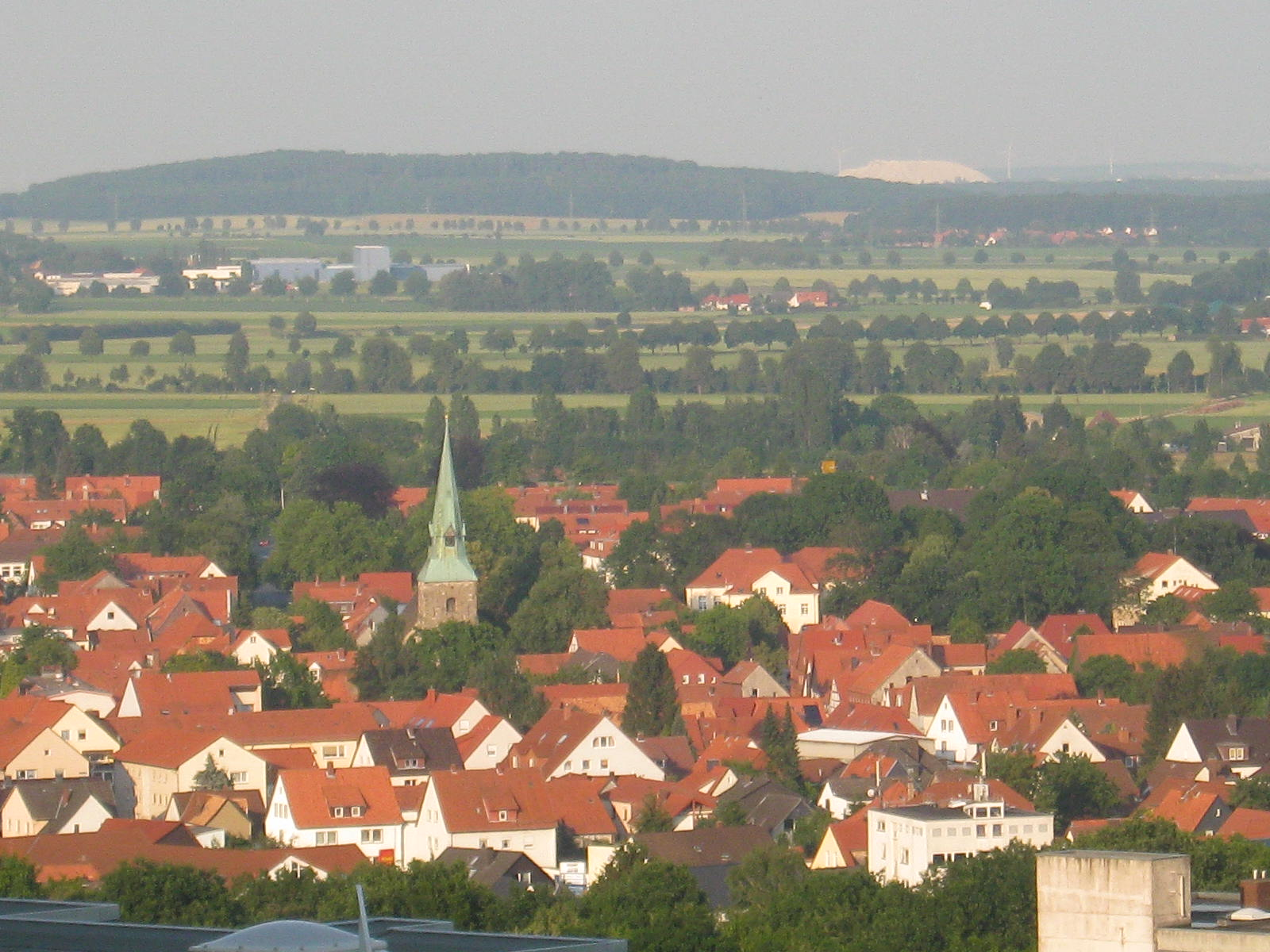 Blick vom Ebersberg auf die Stadt Springe.